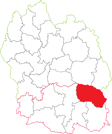 Situation du canton dans le département de la Lozère (France)